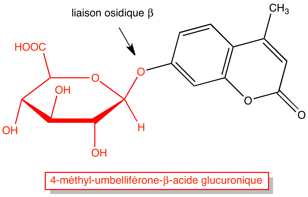 4-methylumbeliferone-bétaglucuronide